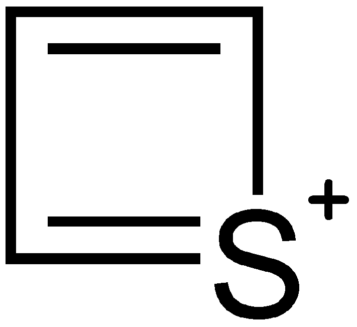 Struktur von Thietium